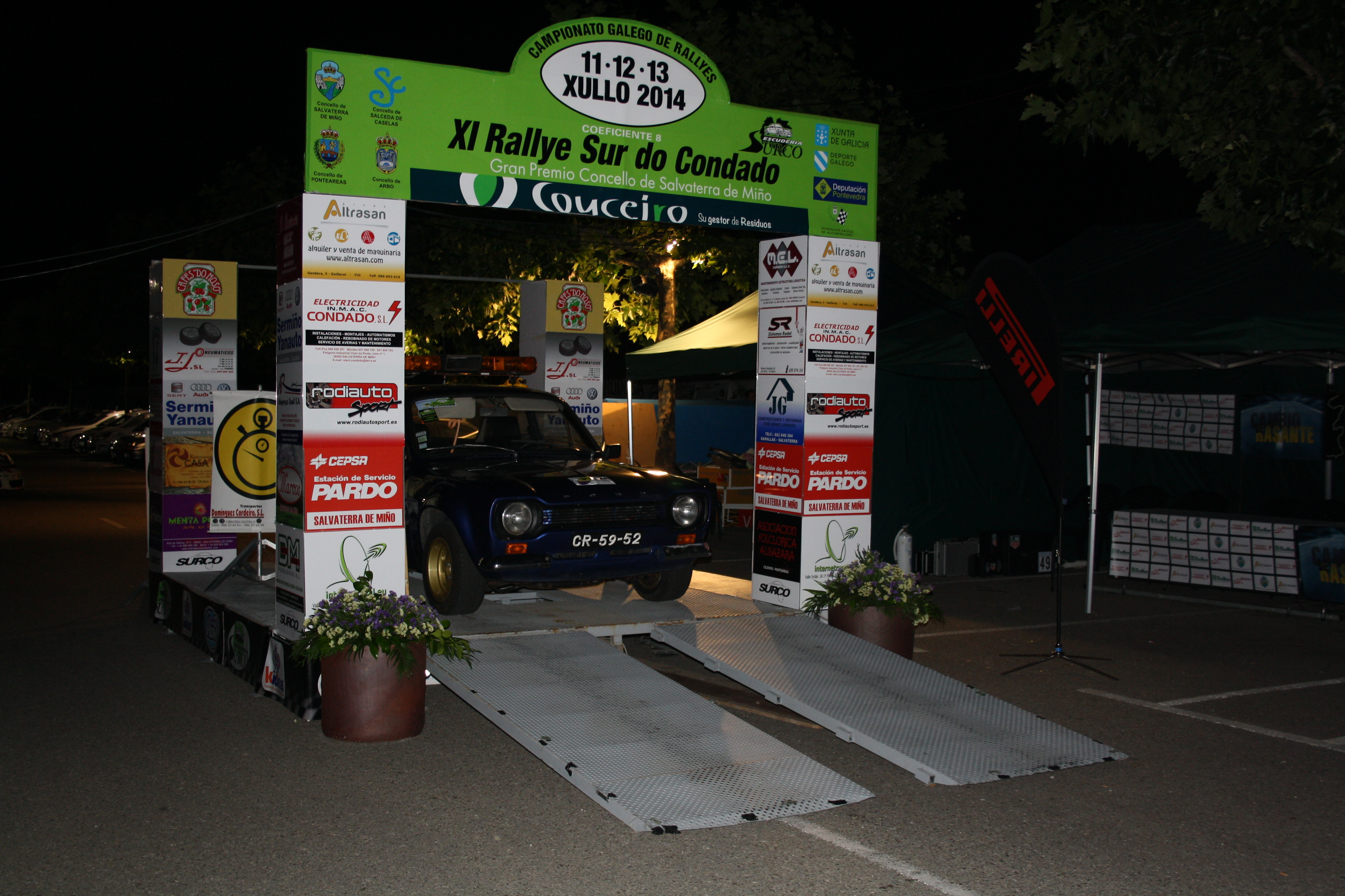 Presentación Rally Sur do Condado